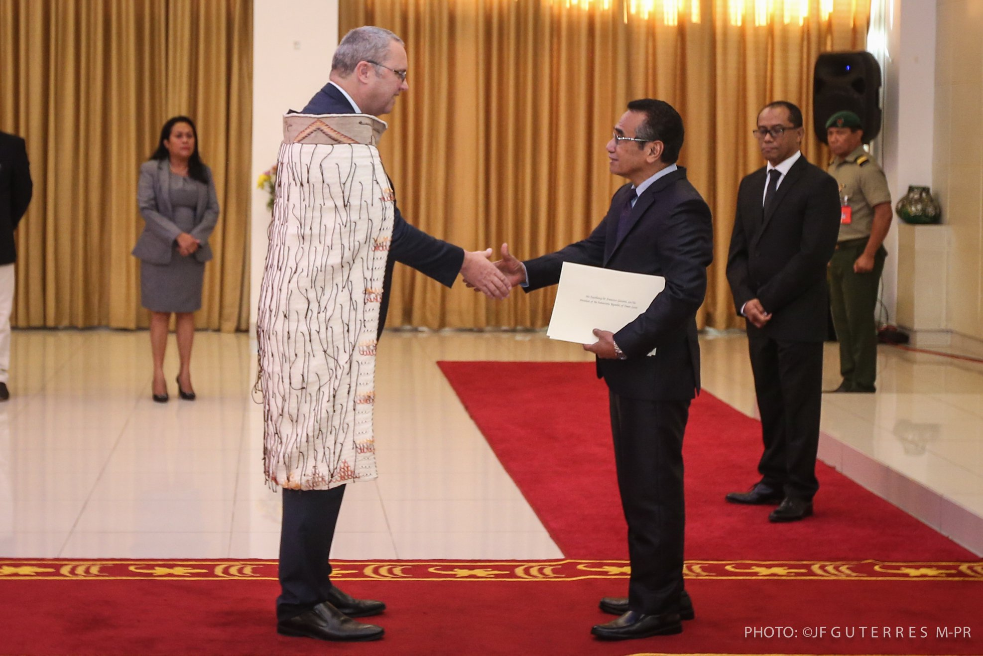 Rob Swartbol, neuseeländischer Botschafter in Osttimor übergibt seine Akkreditierung an Präsident Francisco Guterres